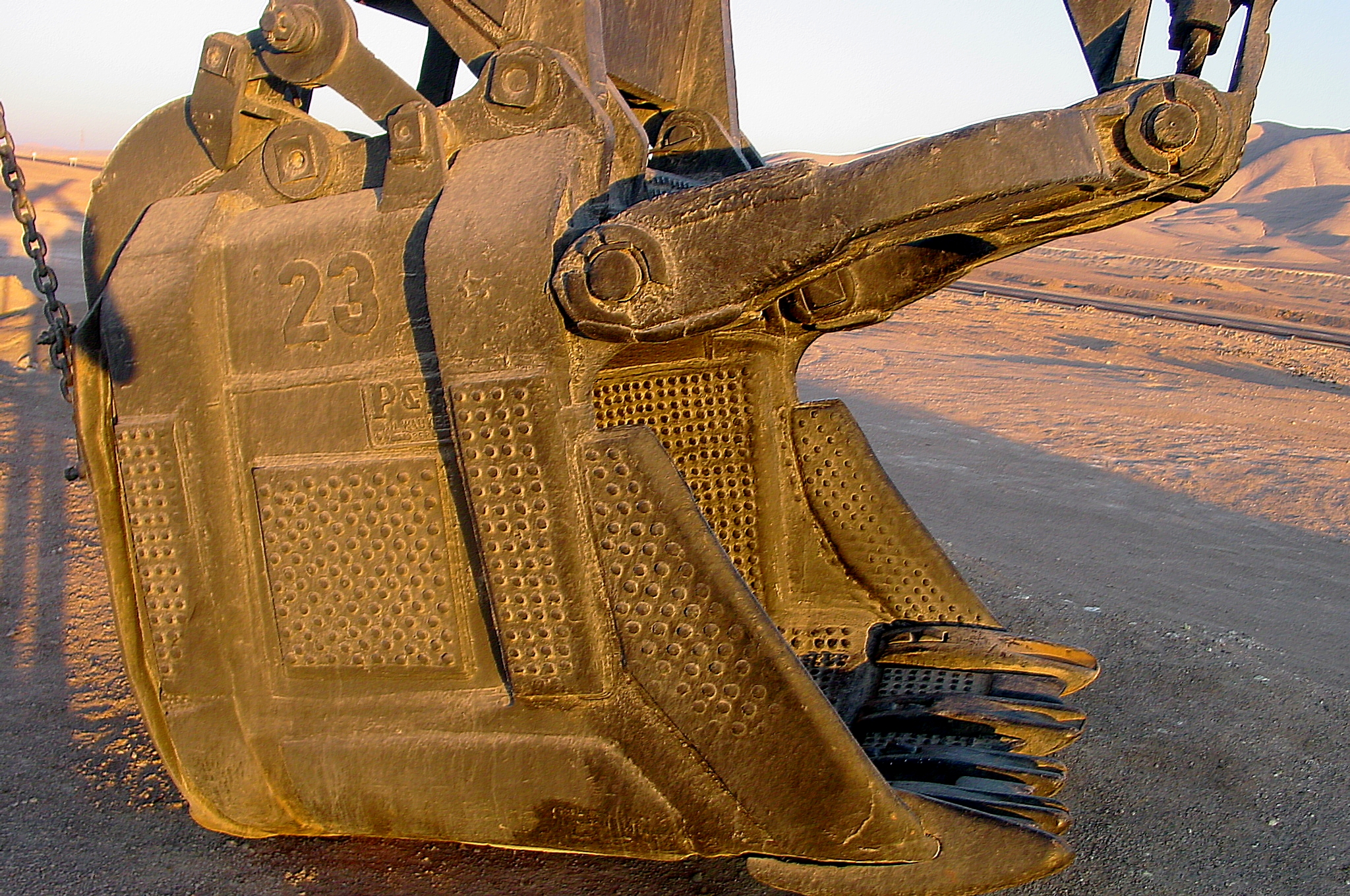 Godet de 3,4m3 d'une pelleteuse Pawling and Harnischfeger 1400, fabriquée en 1966 et en usage jusqu'en 1991 à la mine de Mantos Blancos, commune d'Antofagasta, région II, Chili